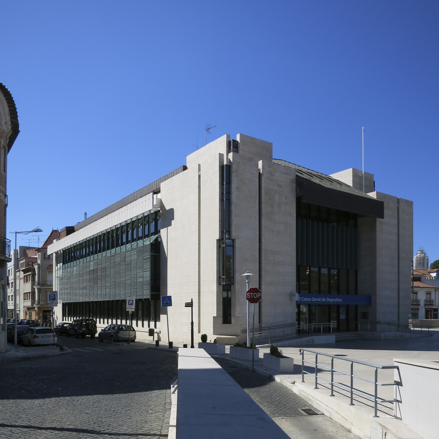 Raúl Chorão Ramalho, Edifício da Caixa Geral de Depósitos, Leiria